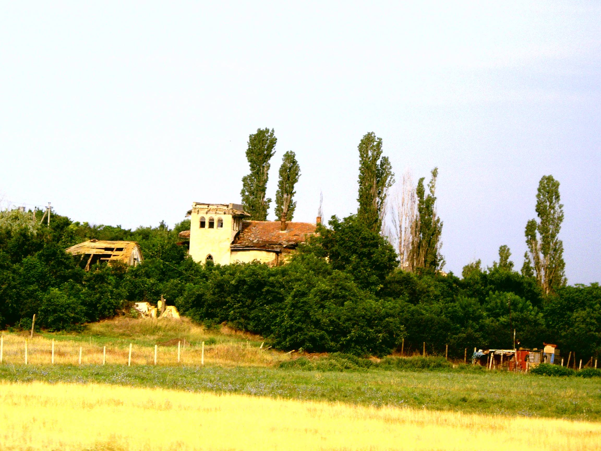 Памятник архитектуры. Помещичий дом в селе Чеботарка (конец 19 ст).